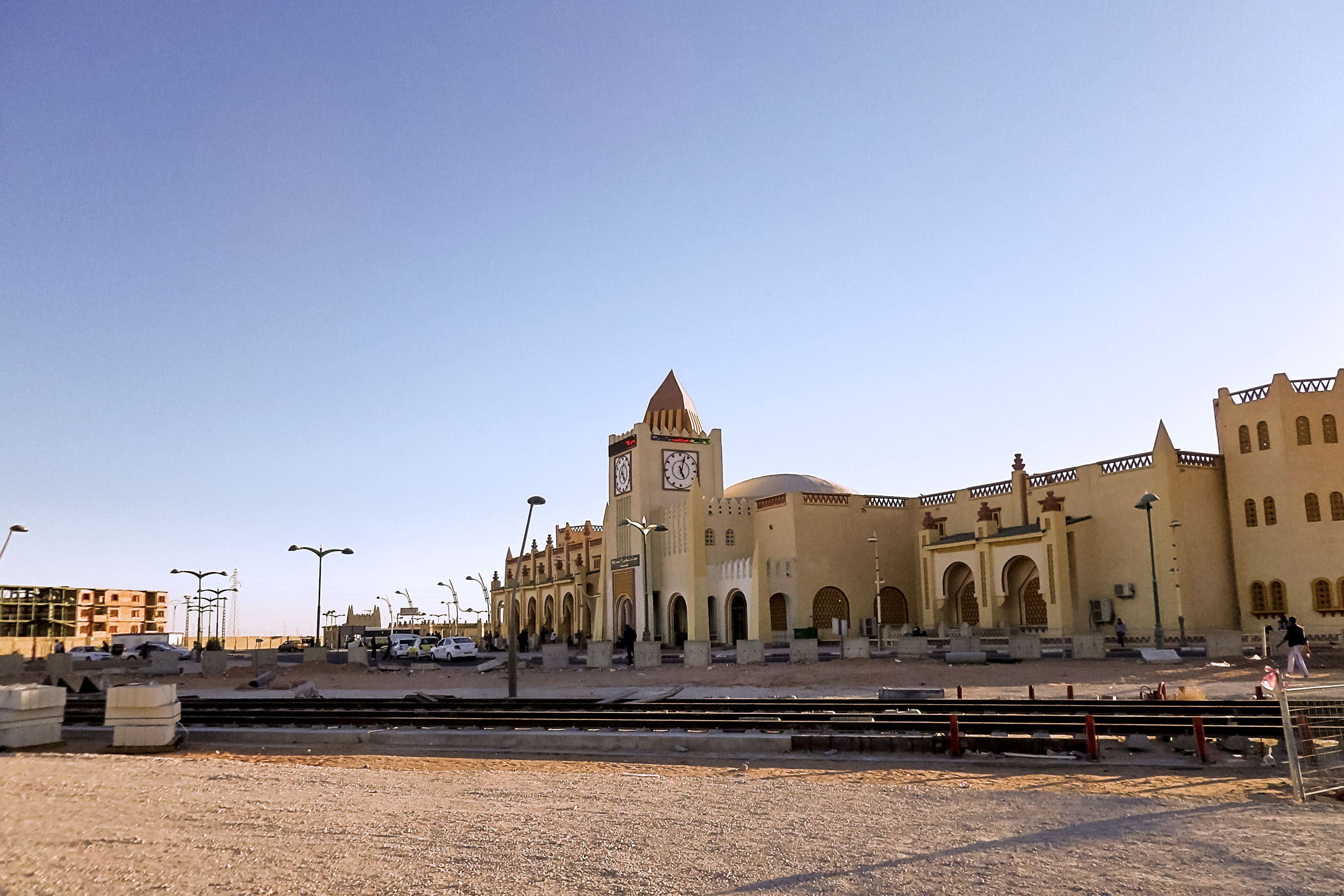 Ville de Ouargla مدينة ورقلة